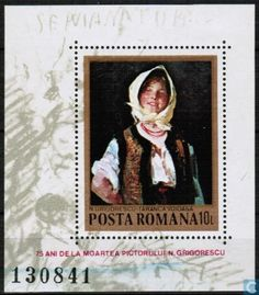 Țărancă voioasă - Timbru emis la 75 de ani de la deces